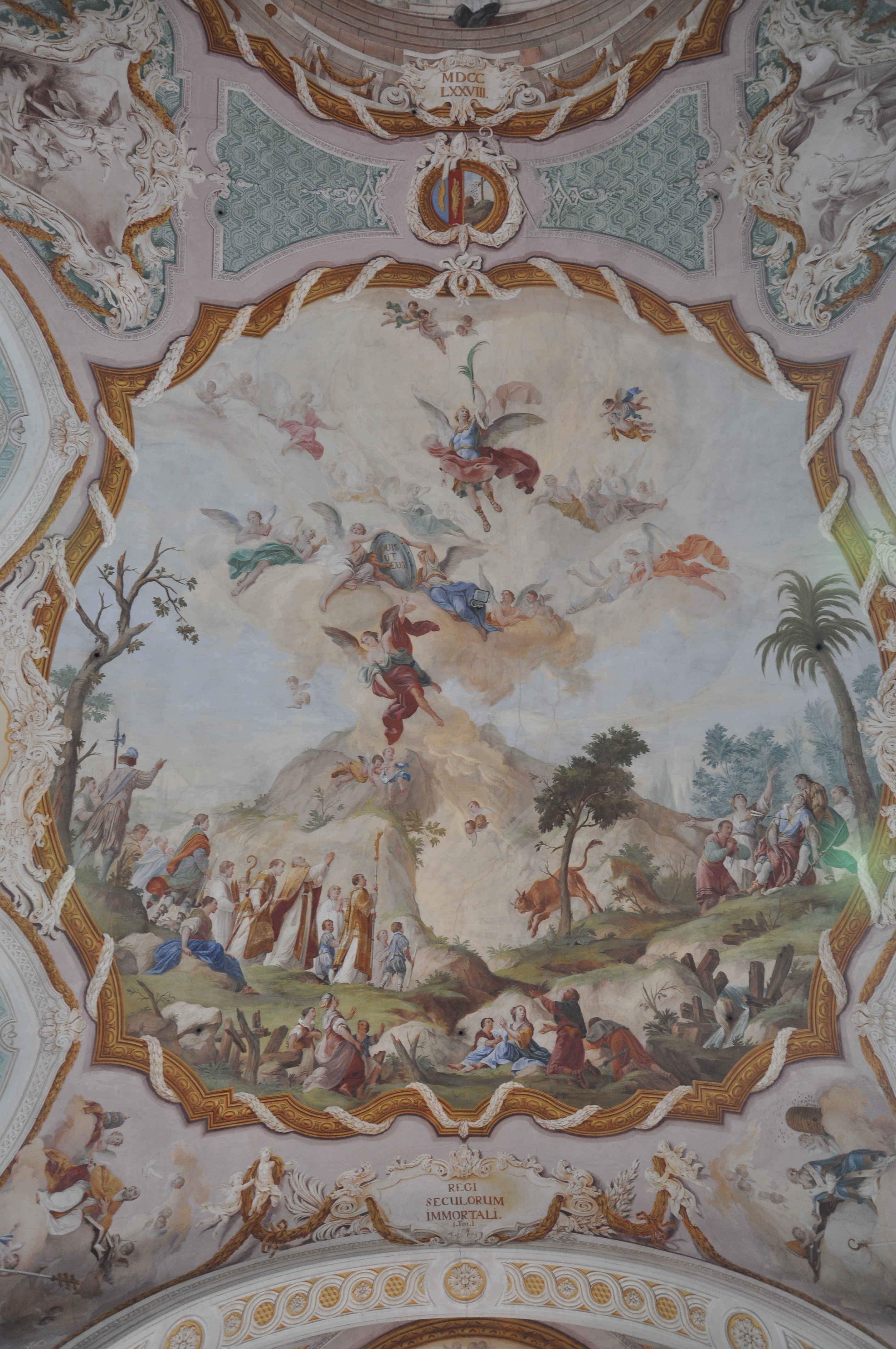 Stiftskirche Reichersberg, Oberösterreich Fresken von Christian Wink, Gründungslegende des Michaelswallfahrtsorts am Monte Sant'Angelo am Gargano (Erzengel Michael erscheint den Hirten im Jahre 492)